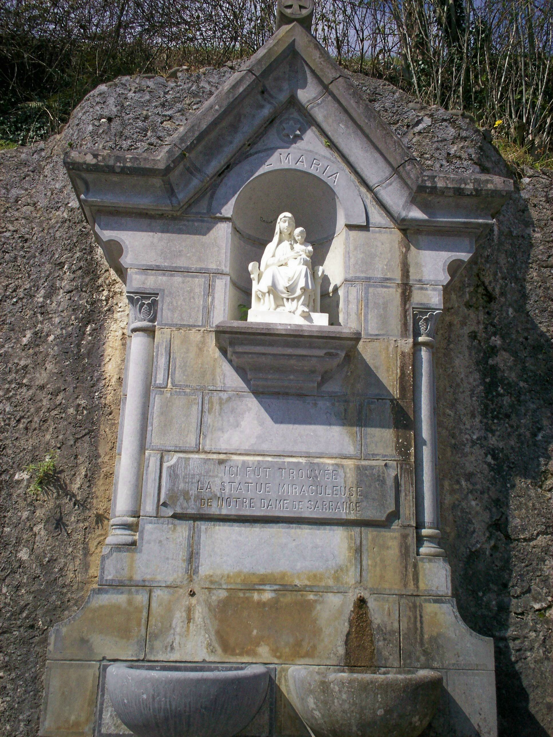 Sarrança - Lòc on ho trovada l'estatua.